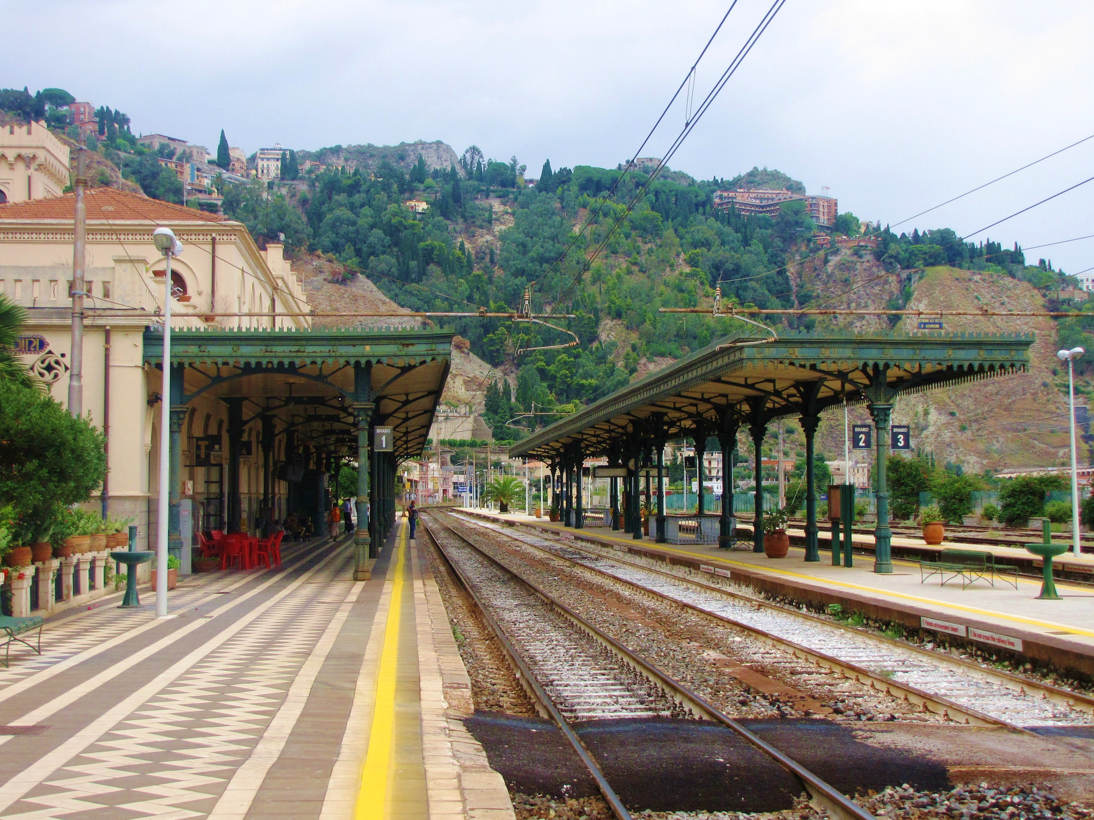 Station FS Giardini-Taormina